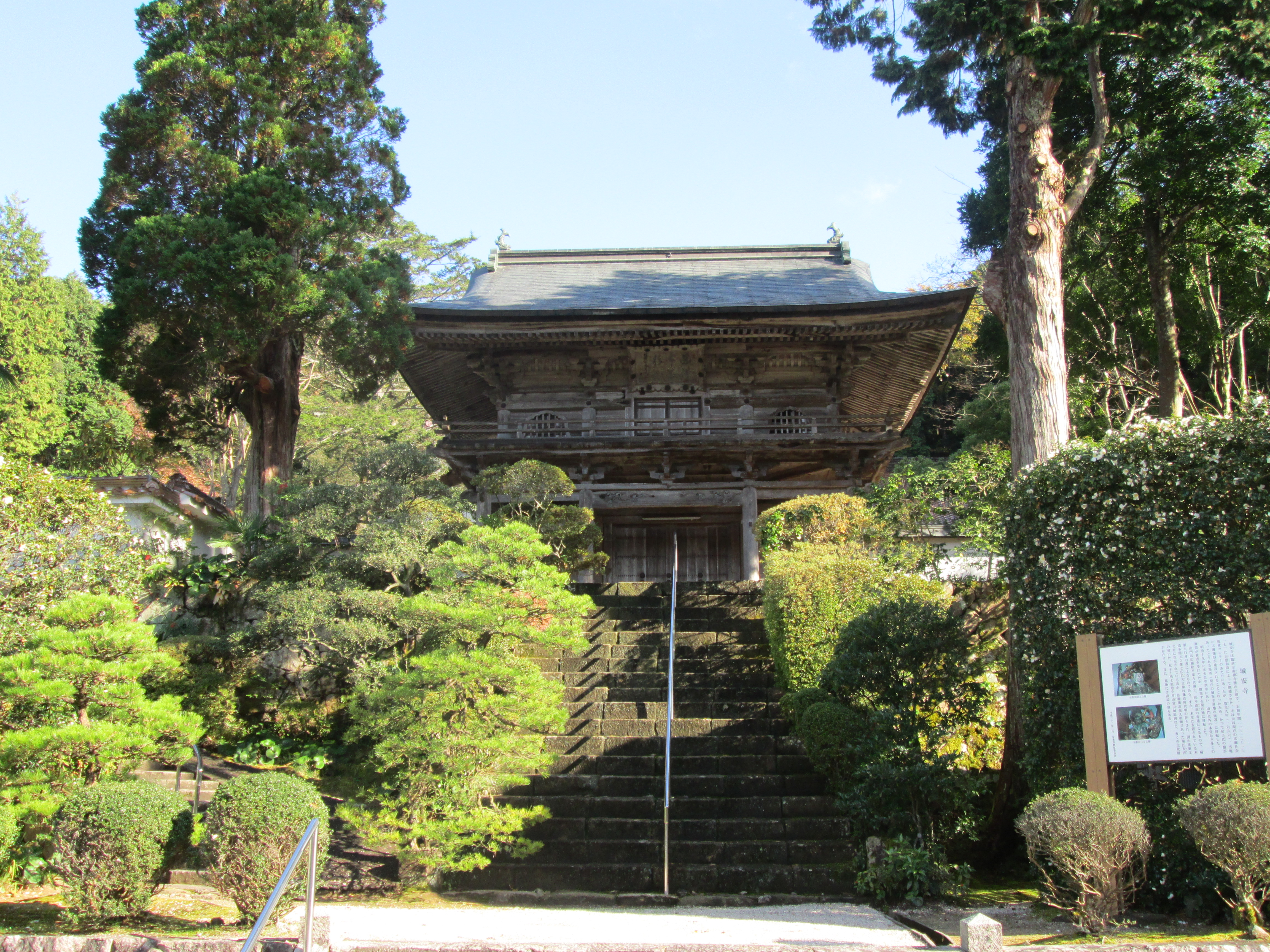 臨済宗南禅寺派の古刹で正和年間（1312年～1317年）に古愚和尚によって創建された、島根県安来市広瀬町にあるお寺。